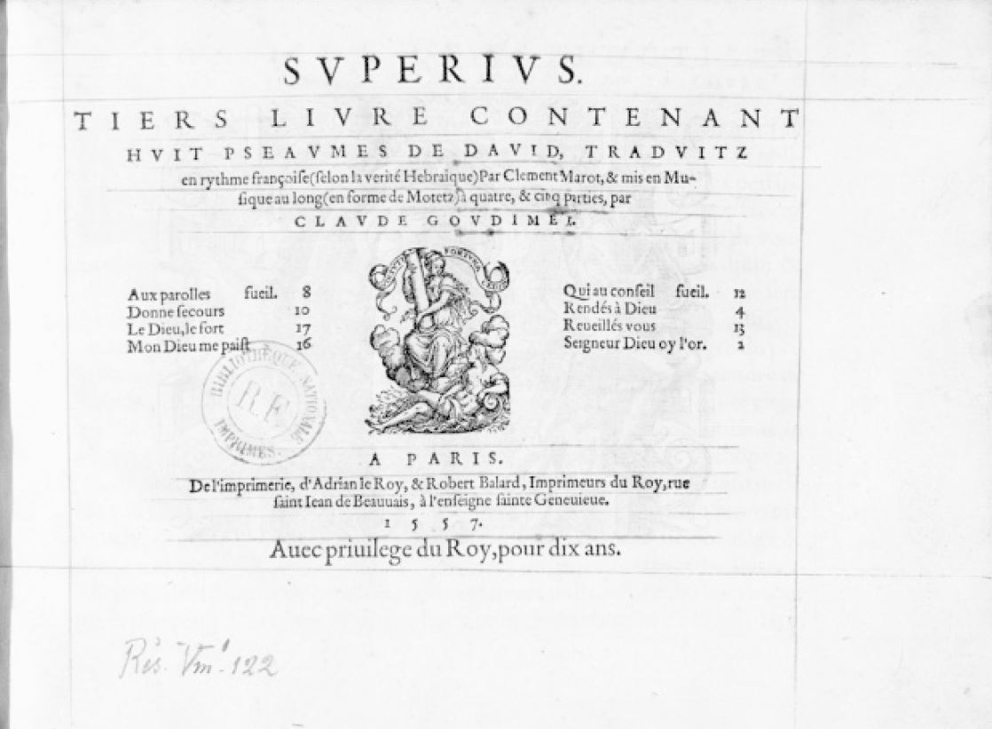 Tite page of Goudimel's Troisième livre de psaumes (Paris, 1553).